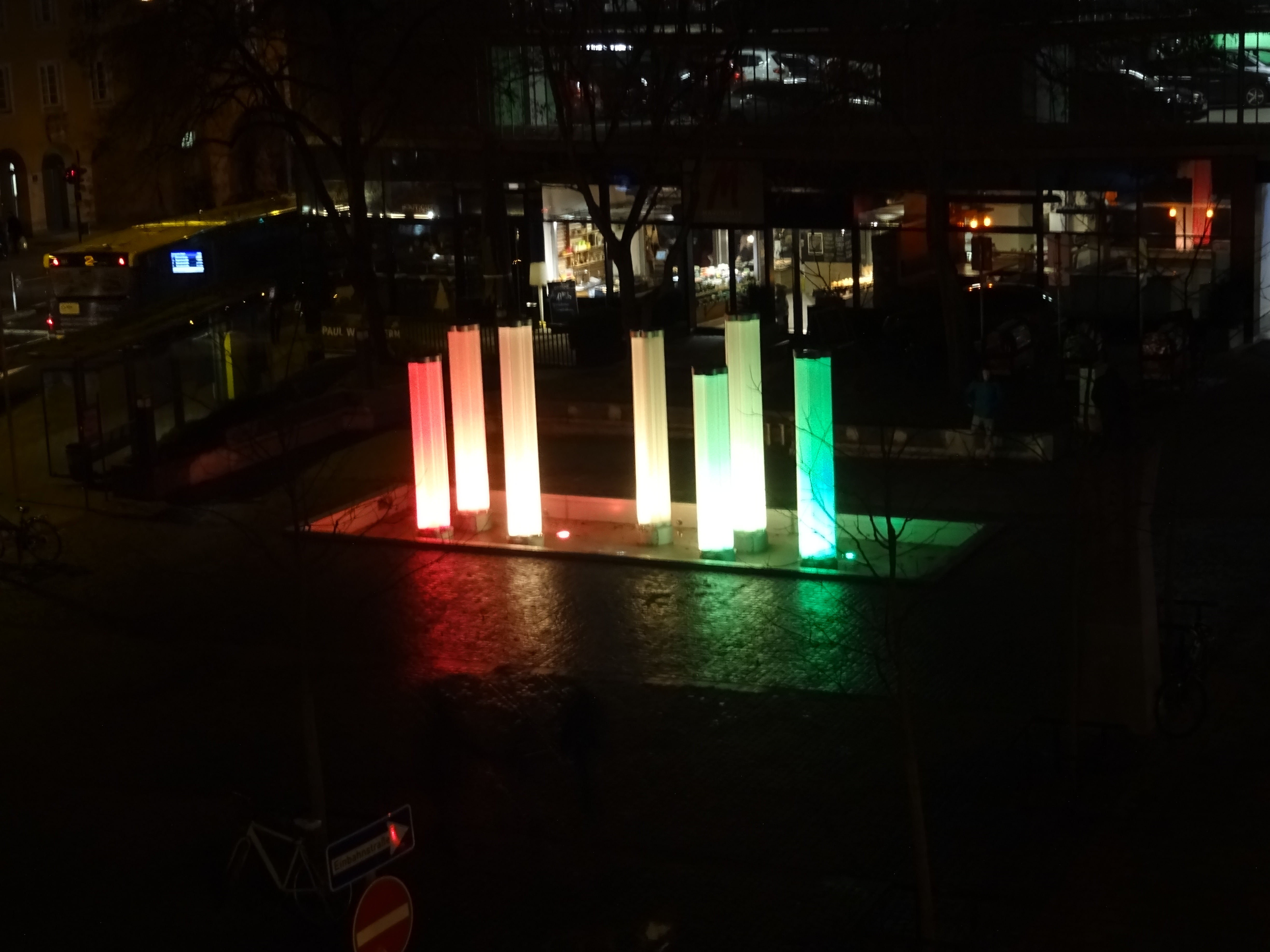 Brunnen am Dachauplatz in Regensburg bei Nacht (Im Winter ohne Wasser)